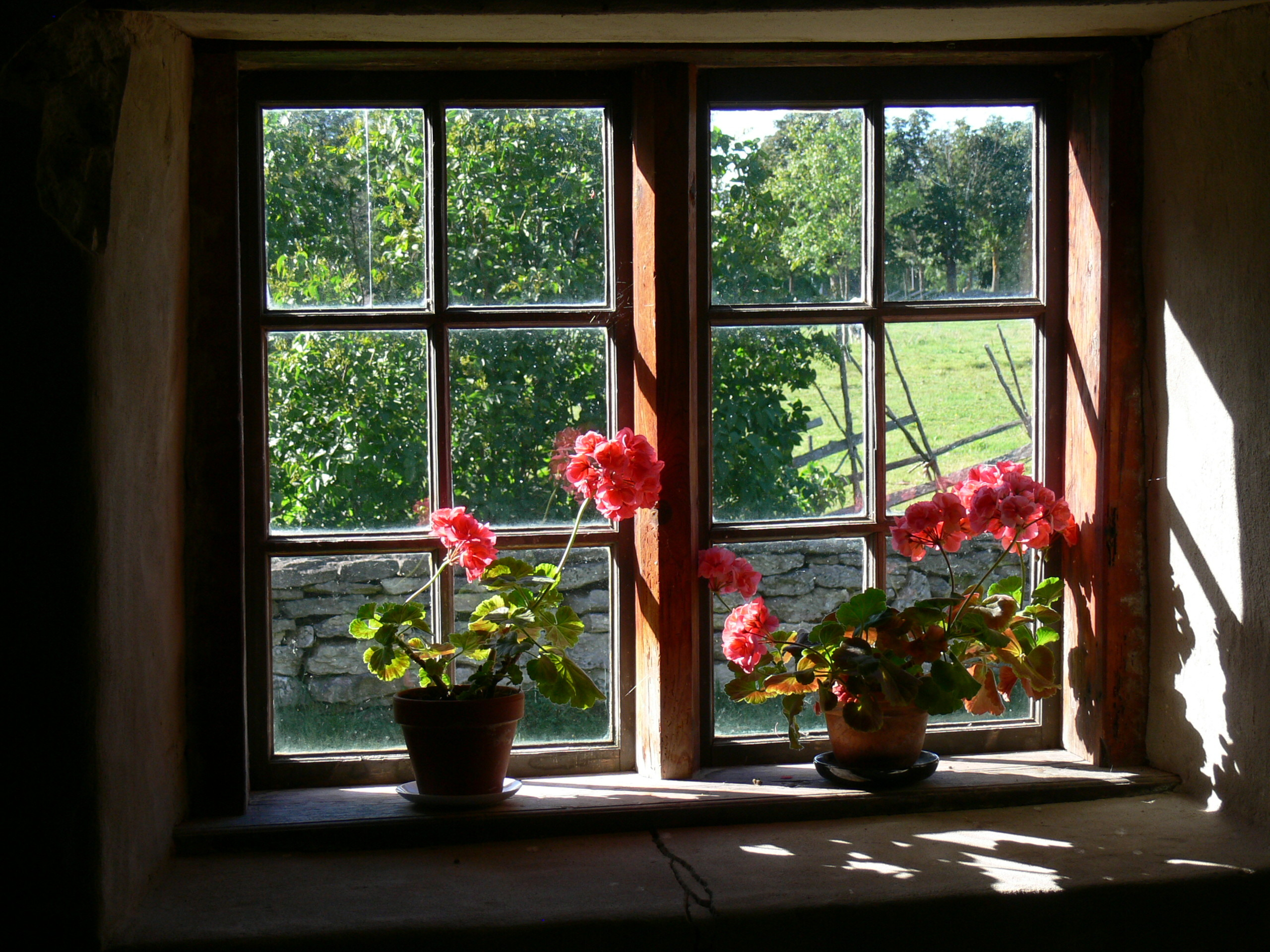 Bunge Museum auf Gotland. Bootsmannshaus ( 19.Jhdt. ): Blick aus dem Fenster